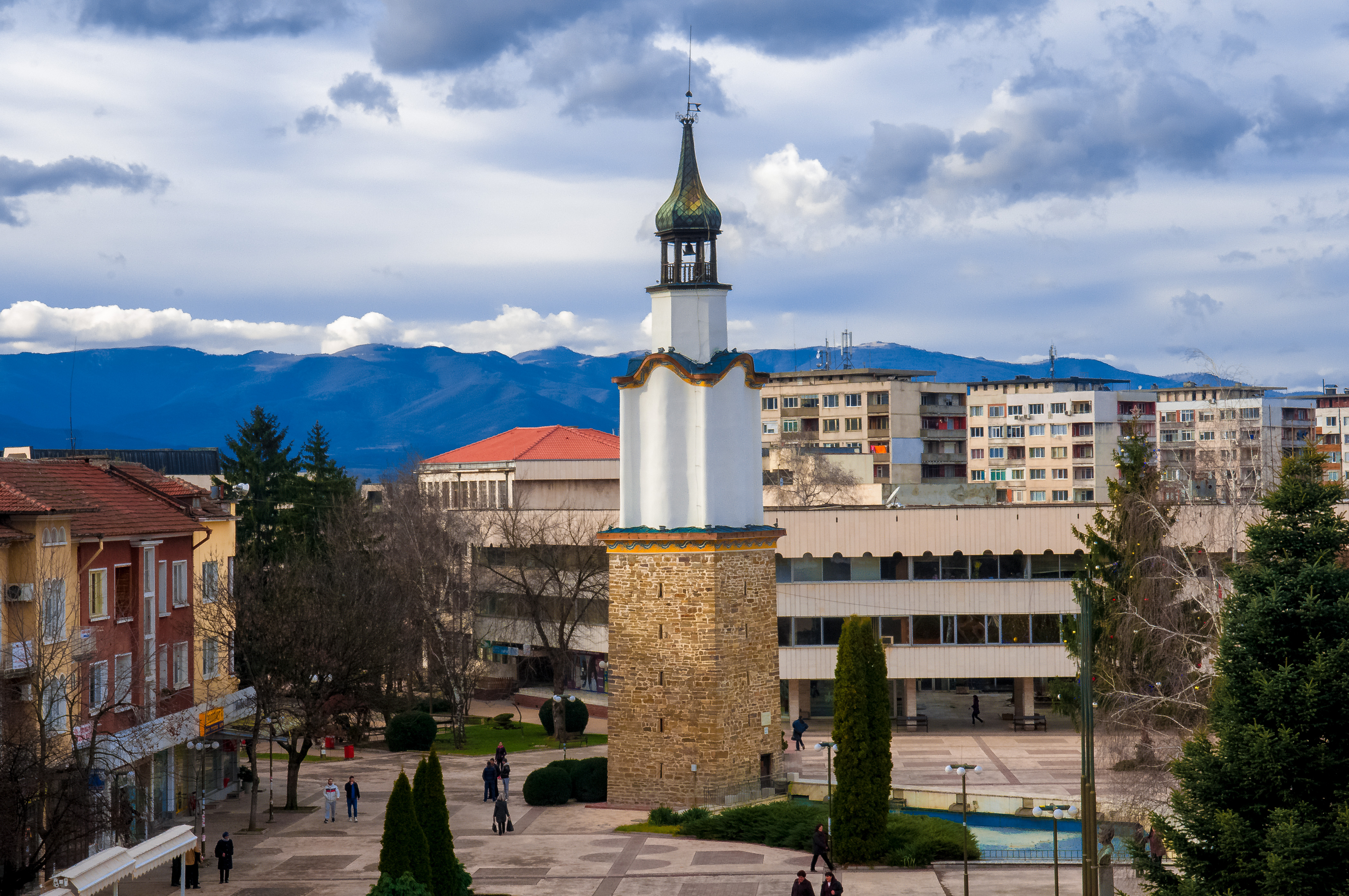 Часовникова кула в Ботевград